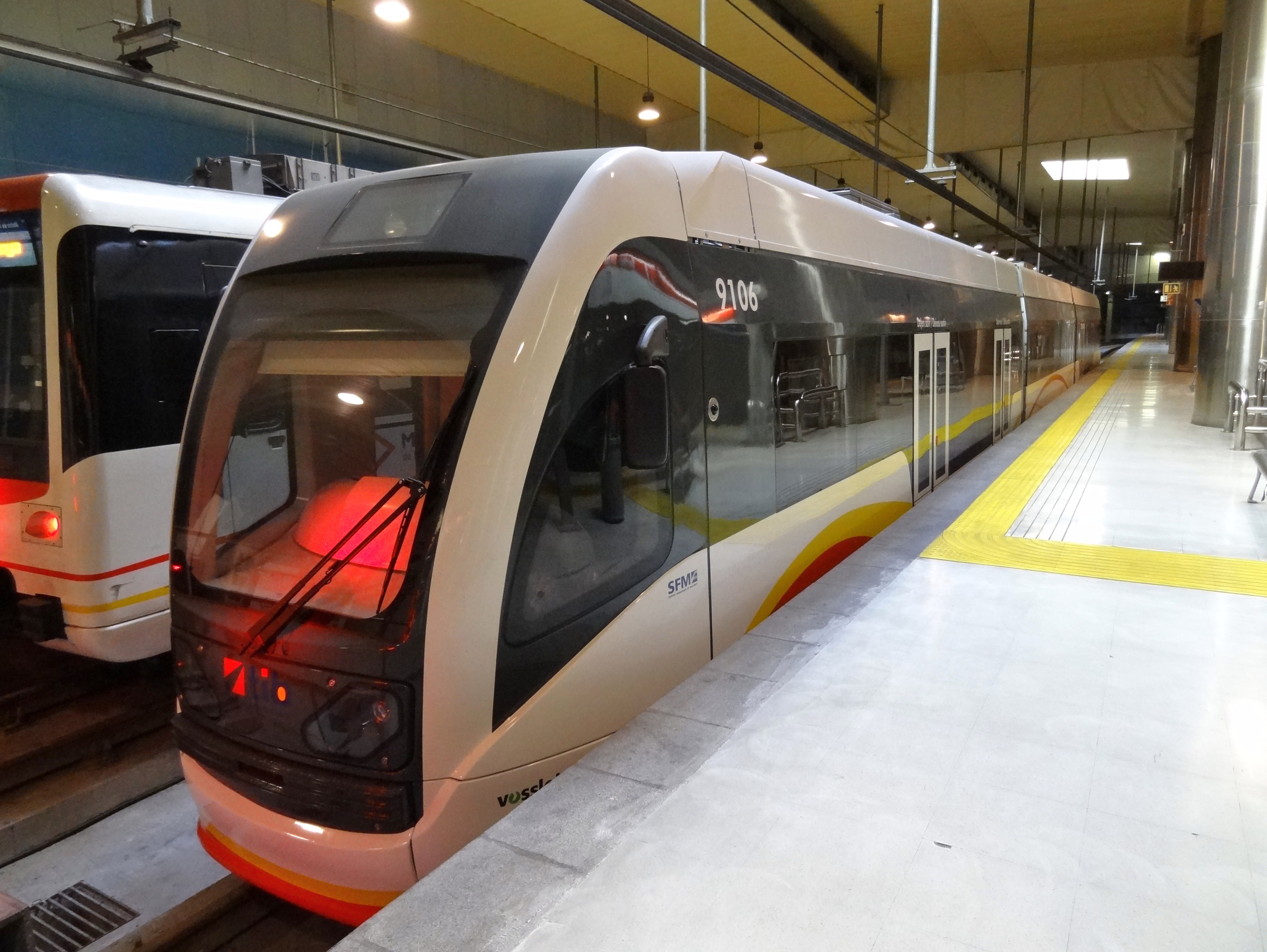 Estació Intermodal an der Plaça de Espanya in Palma, Mallorca, Spanien